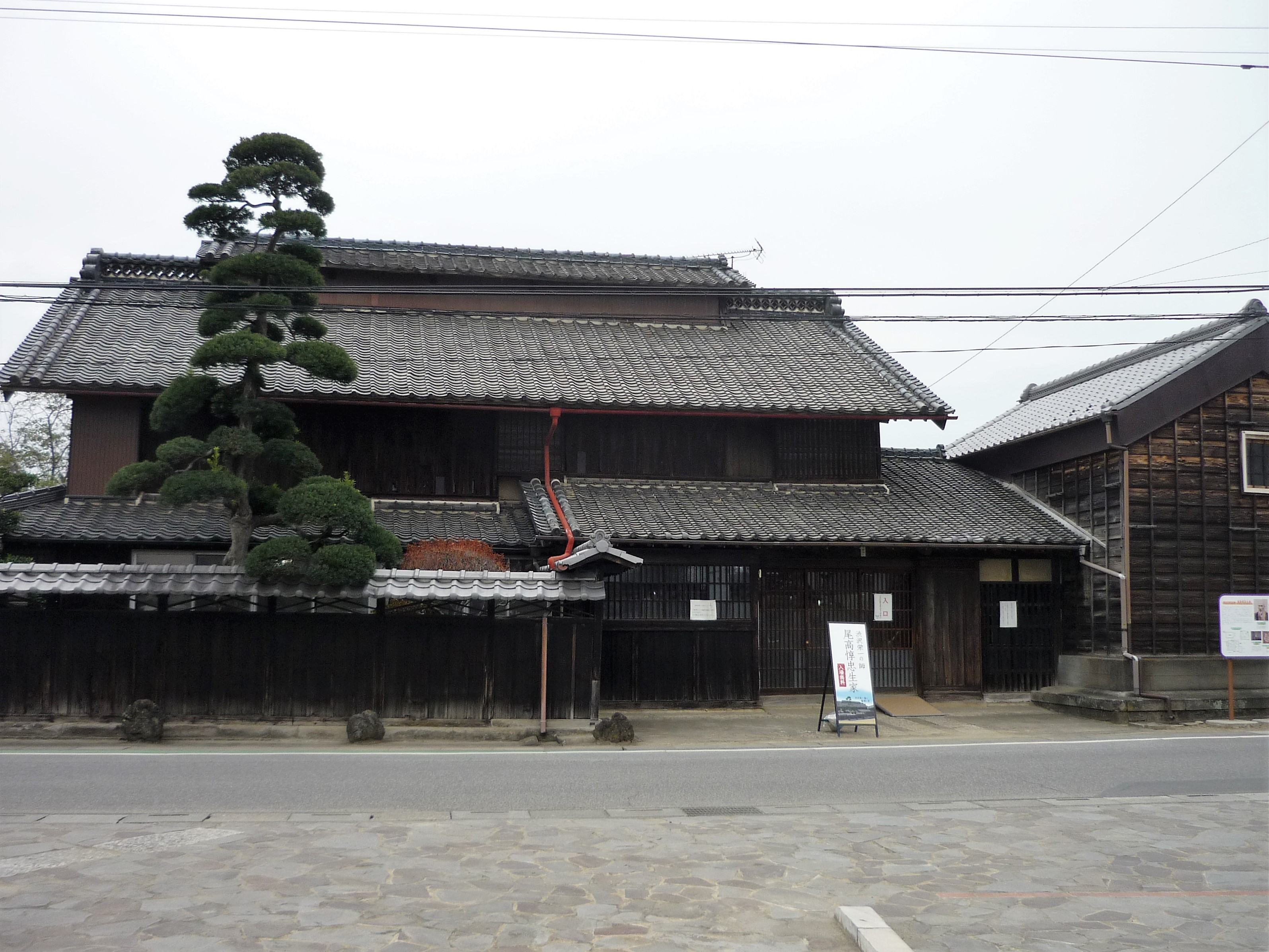 尾高惇忠生家 Panasonic Lumix DMC-FS3